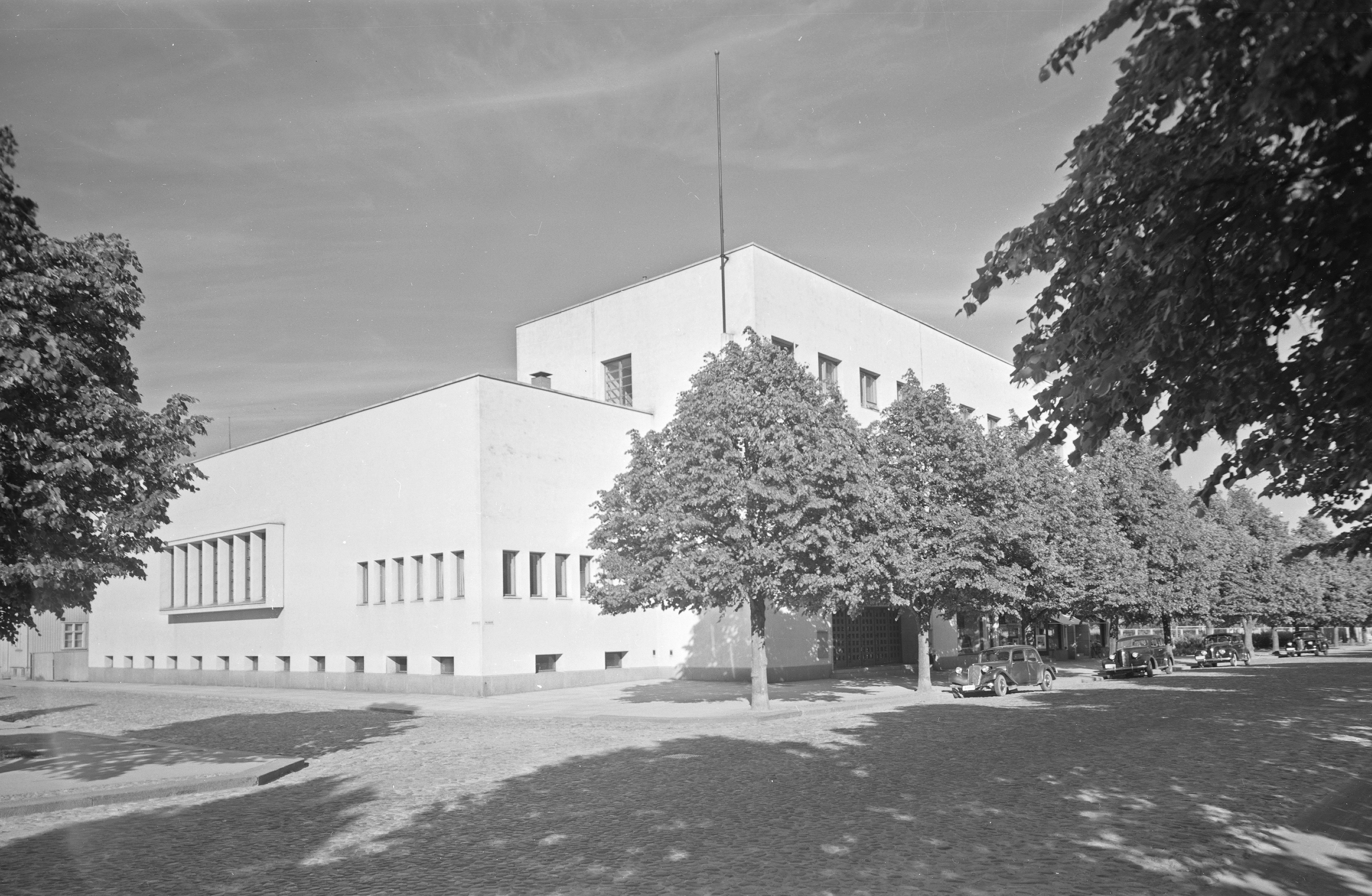 Arkkitehti Erkki Huttusen suunnittelema, vuonna 1933 valmistunut Rauman suojeluskuntatalo Raumanlinna, suojeluskunnalla oli rakennuksessa iso juhlasali, samalla siinä toimi myös hotelli ja ravintola.